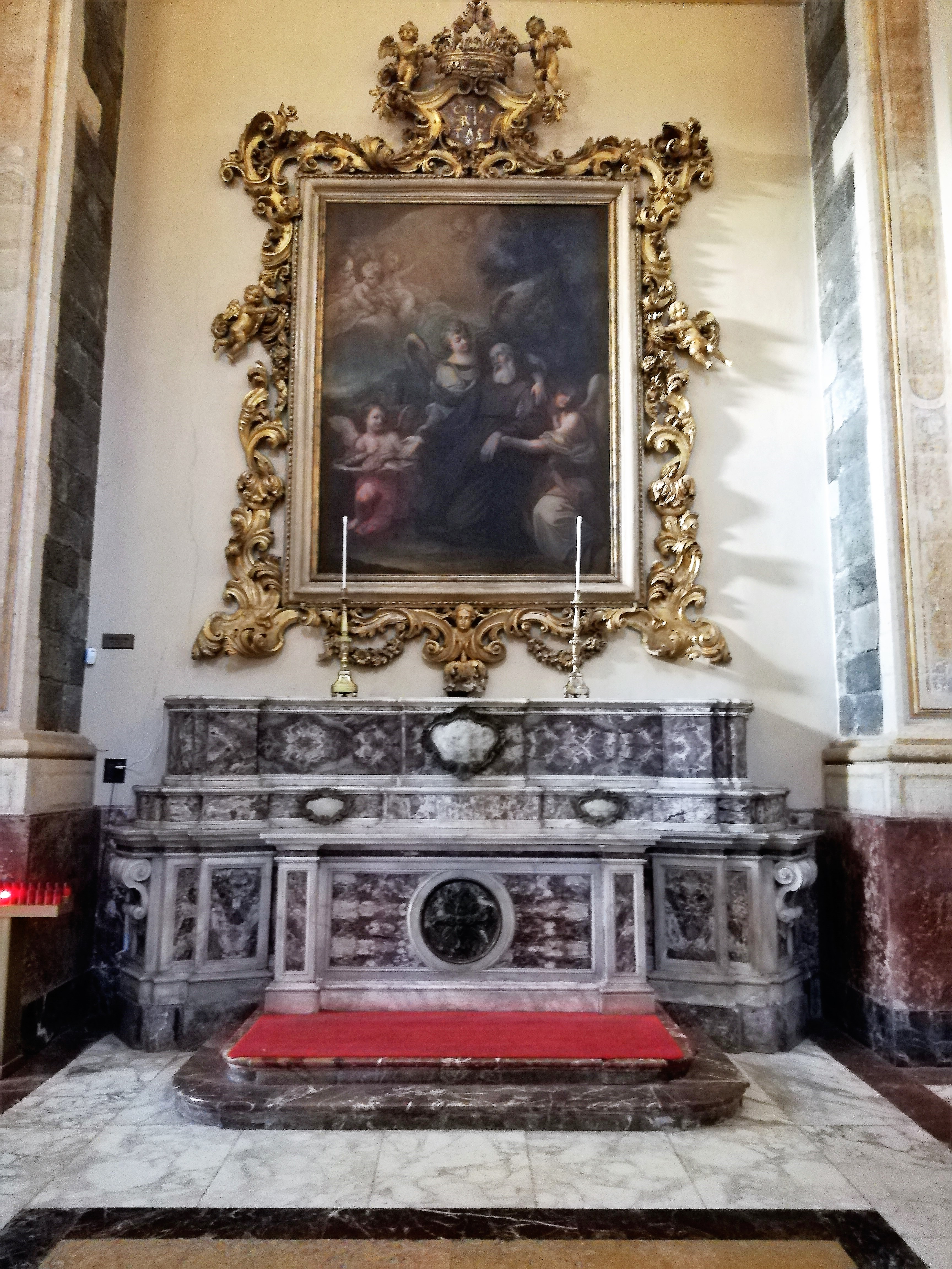 Cappella di San Francesco di Paola, dipinto raffigurante San Francesco di Paola, opera di Giuseppe Guarnaccia.